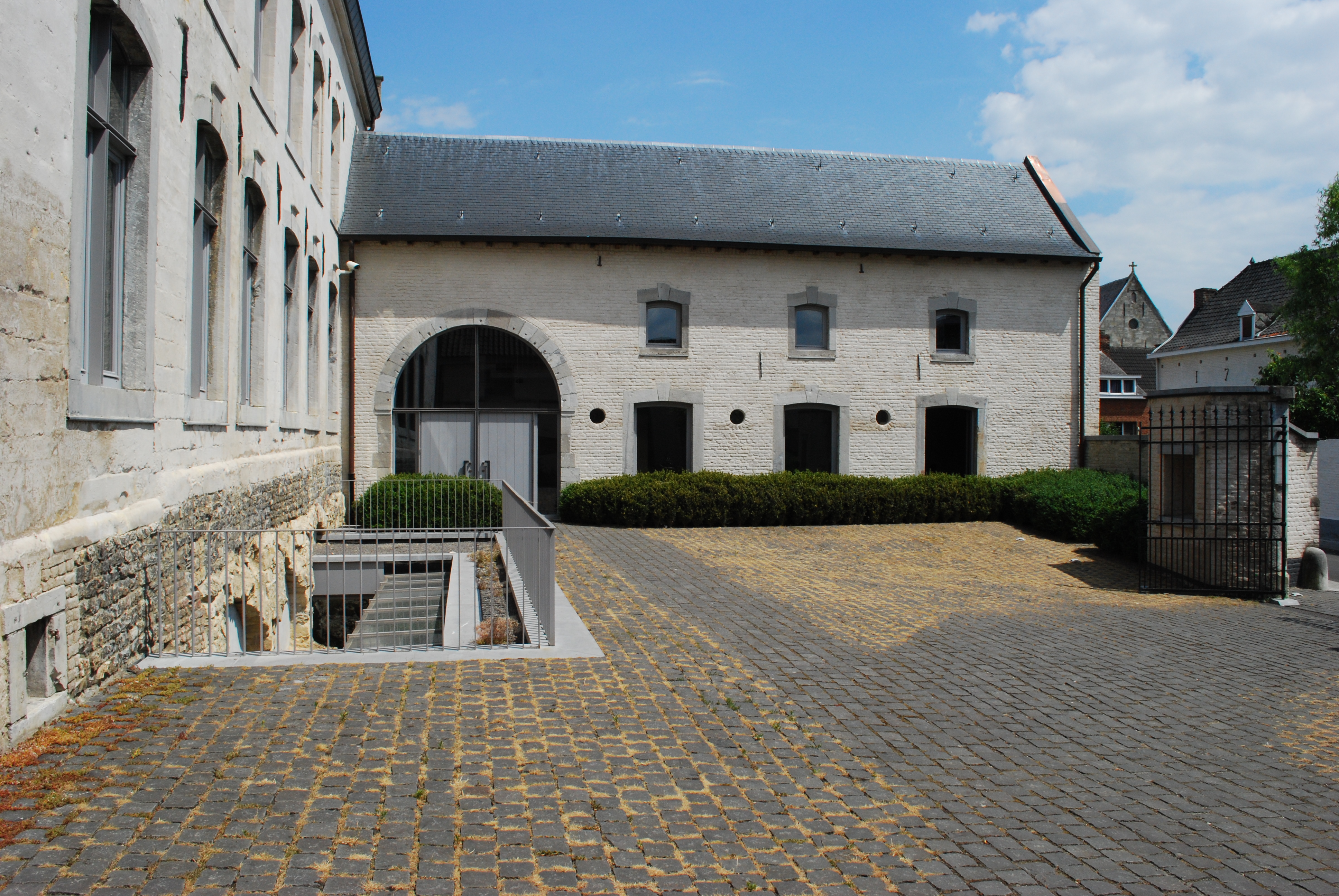 Le couvent des Soeurs de Sainte-Agnès au béguinage de Tongres. À gauche, aile dite gothique, à droite aile sud. Remarquer au fond à droite, pignon de la façade occidentale de l'église du béguinage.